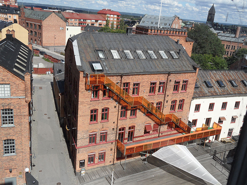 Kårhuset Trappan Norrköping